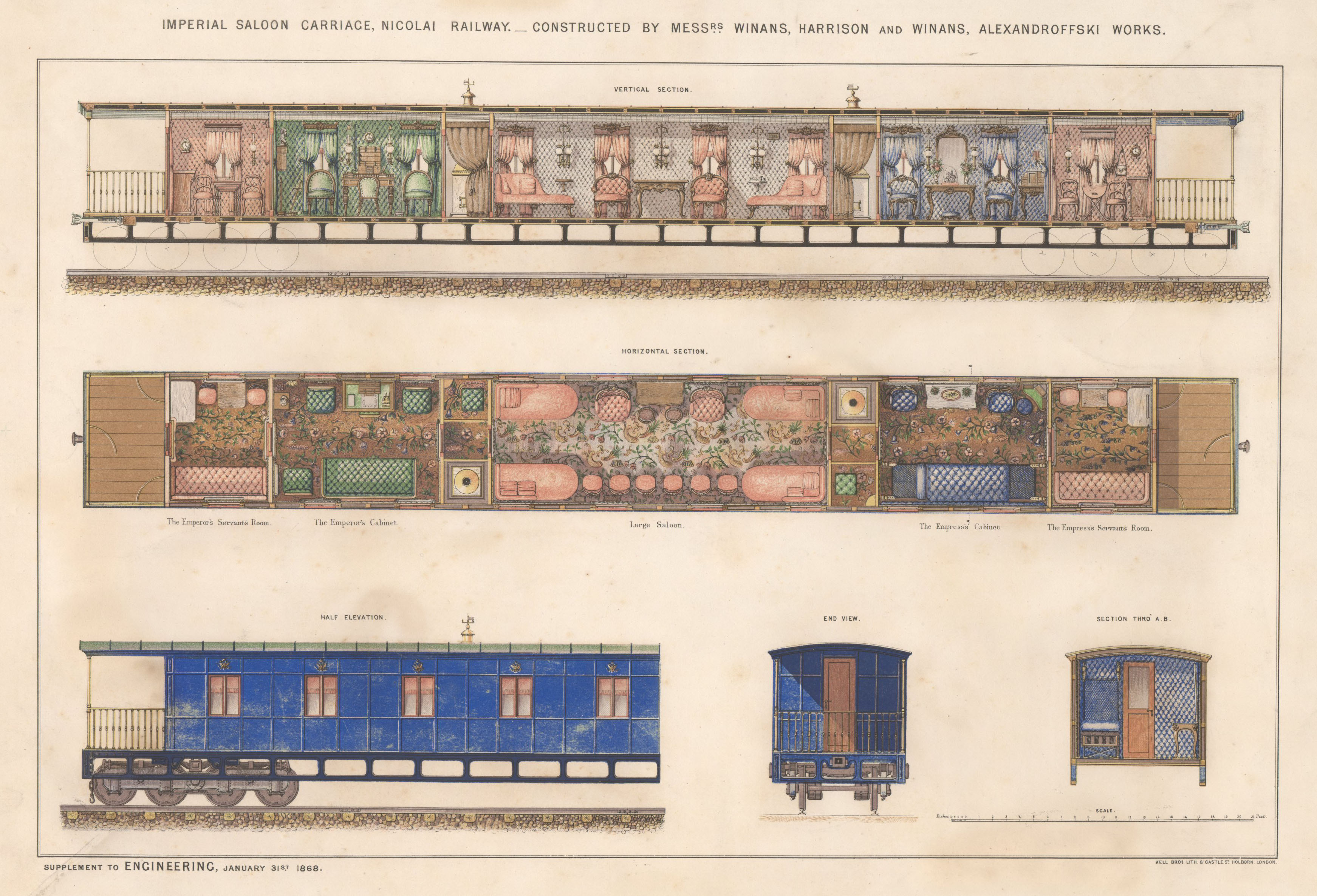 Императорский вагон Санкт-Петербурго-Московской железной дороги построенный в конце 1840-х годов.